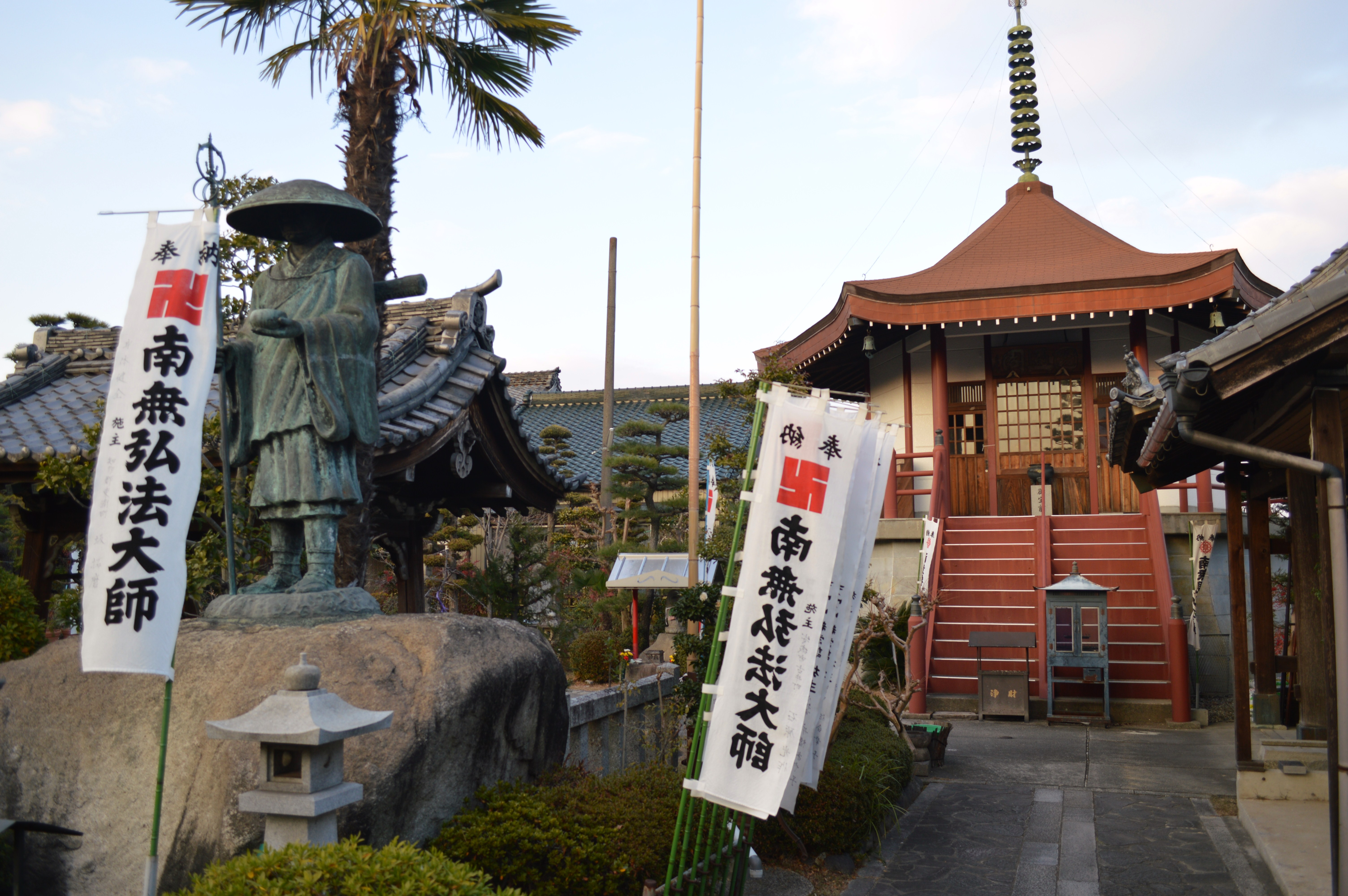 愛知県刈谷市|刈谷市一ツ木町にある曹洞宗の寺院「西福寺」